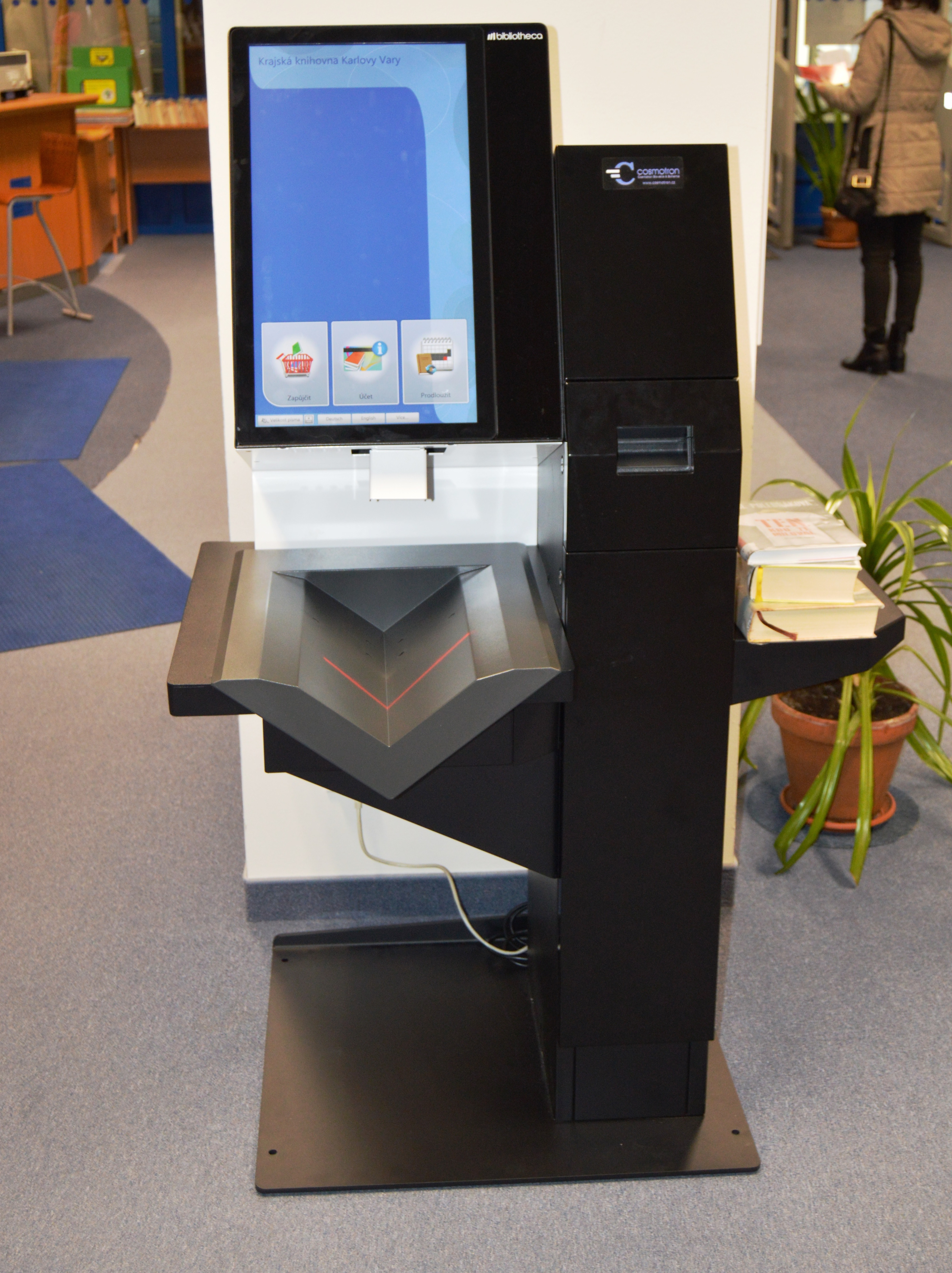 SelfCheck pro samoobslužné načtení knih do konta, umístěn v centrální hale hlavní budovy ve Dvorech.